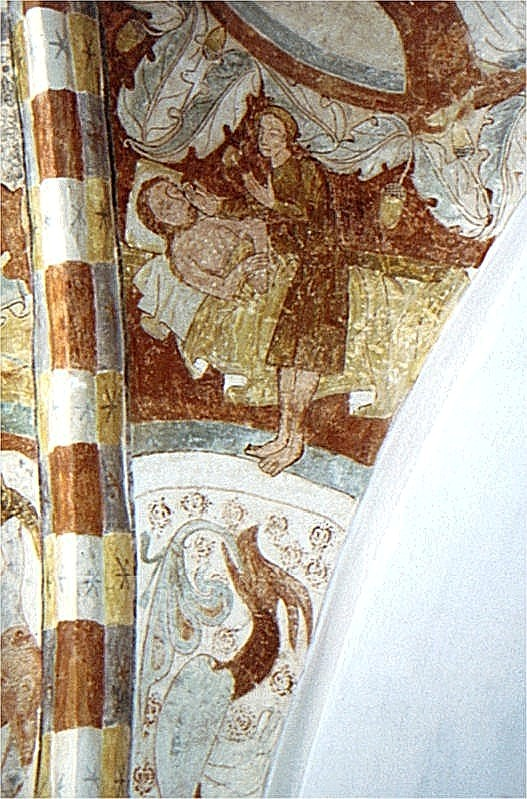 Østofte Kirke i Danmark. Vestkappe sydsvikkel, Seth ved Adams dødsleje